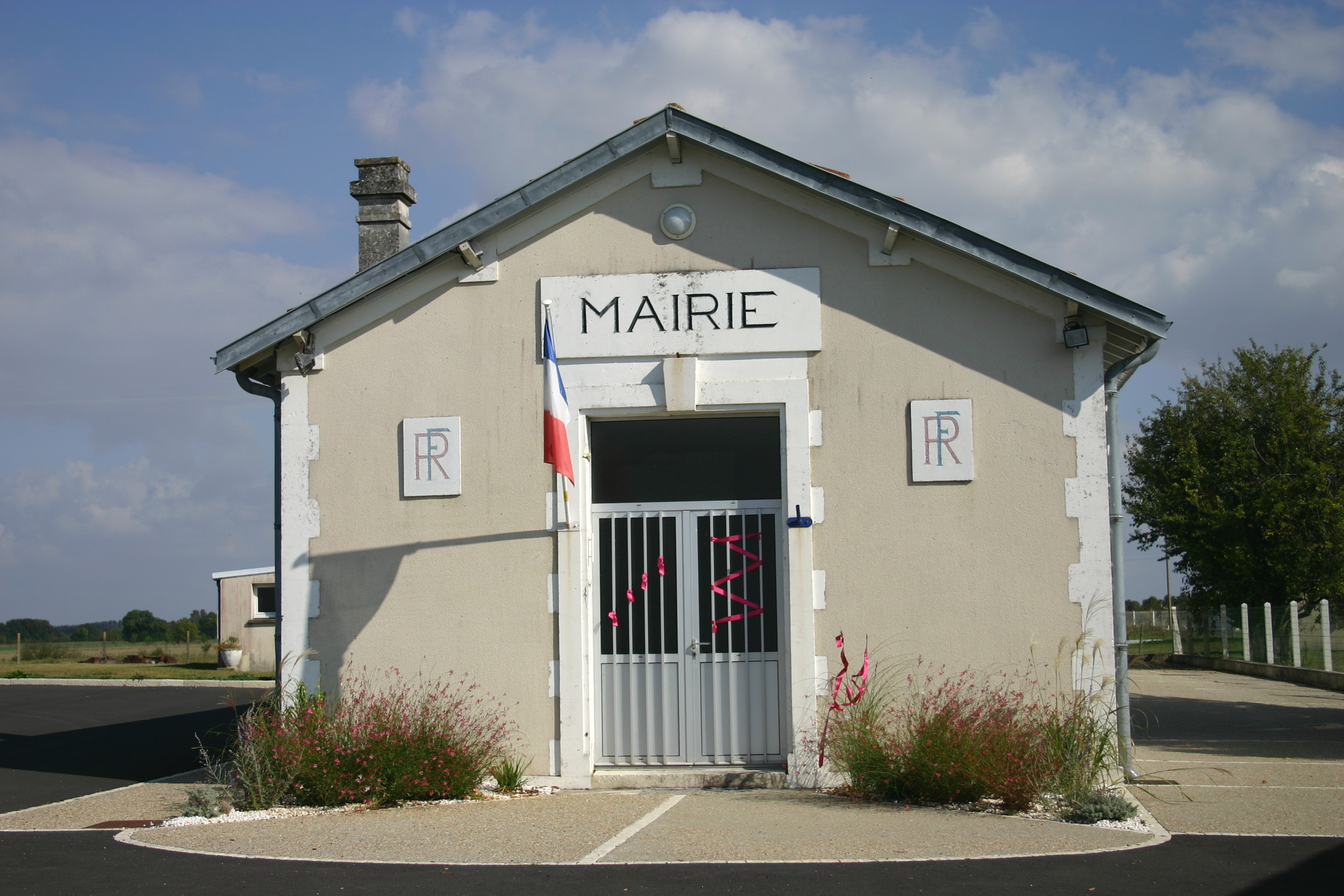 Mairie de Chantemerle-sur-la-Soie